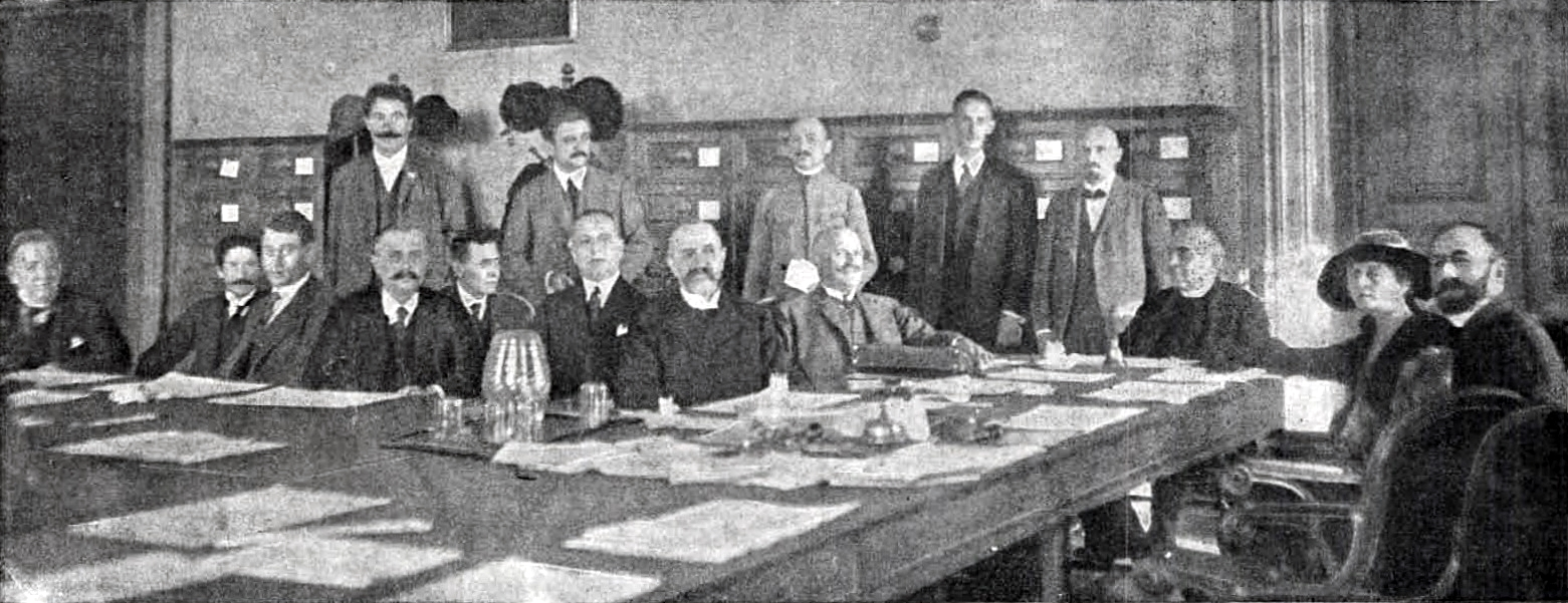 A Magyar Nemzeti Tanács 1918 novemberében. Az asztal mellett ülnek balról jobbra: Zboray Miklós, Rónai Zoltán, Magyar Lajos, Nagyatádi Szabó István, Vanczák János, Purjesz Lajos, Székely Ferenc, Fernbach Károly, Hock János elnök, Groák Ödönné, Vámbéry Rusztem. Állnak balról jobbra: Nagy György, Kernstock Károly, (György Károly, Virányi Gida, Korányi Márton)